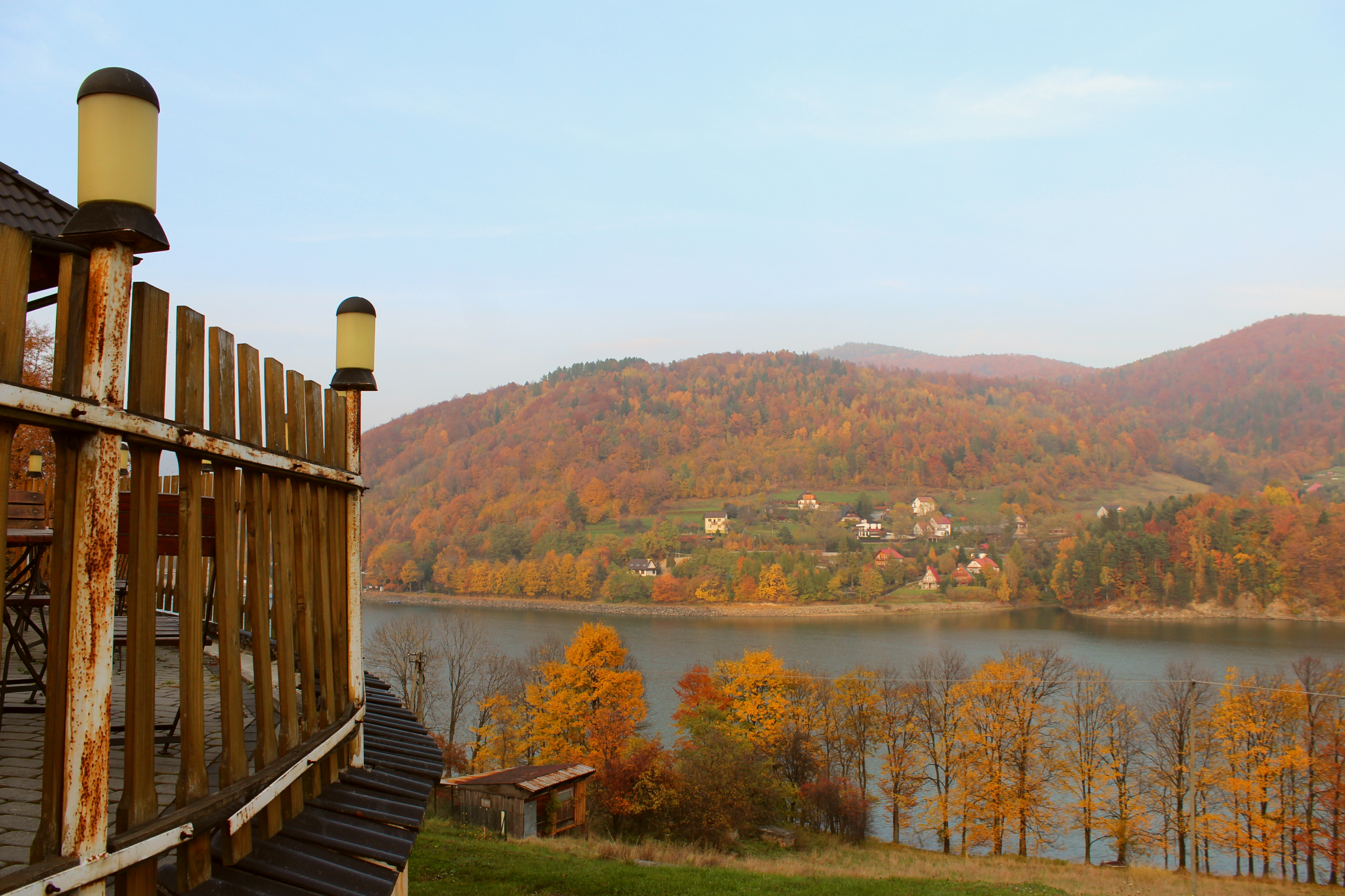 Żywiec, Poland